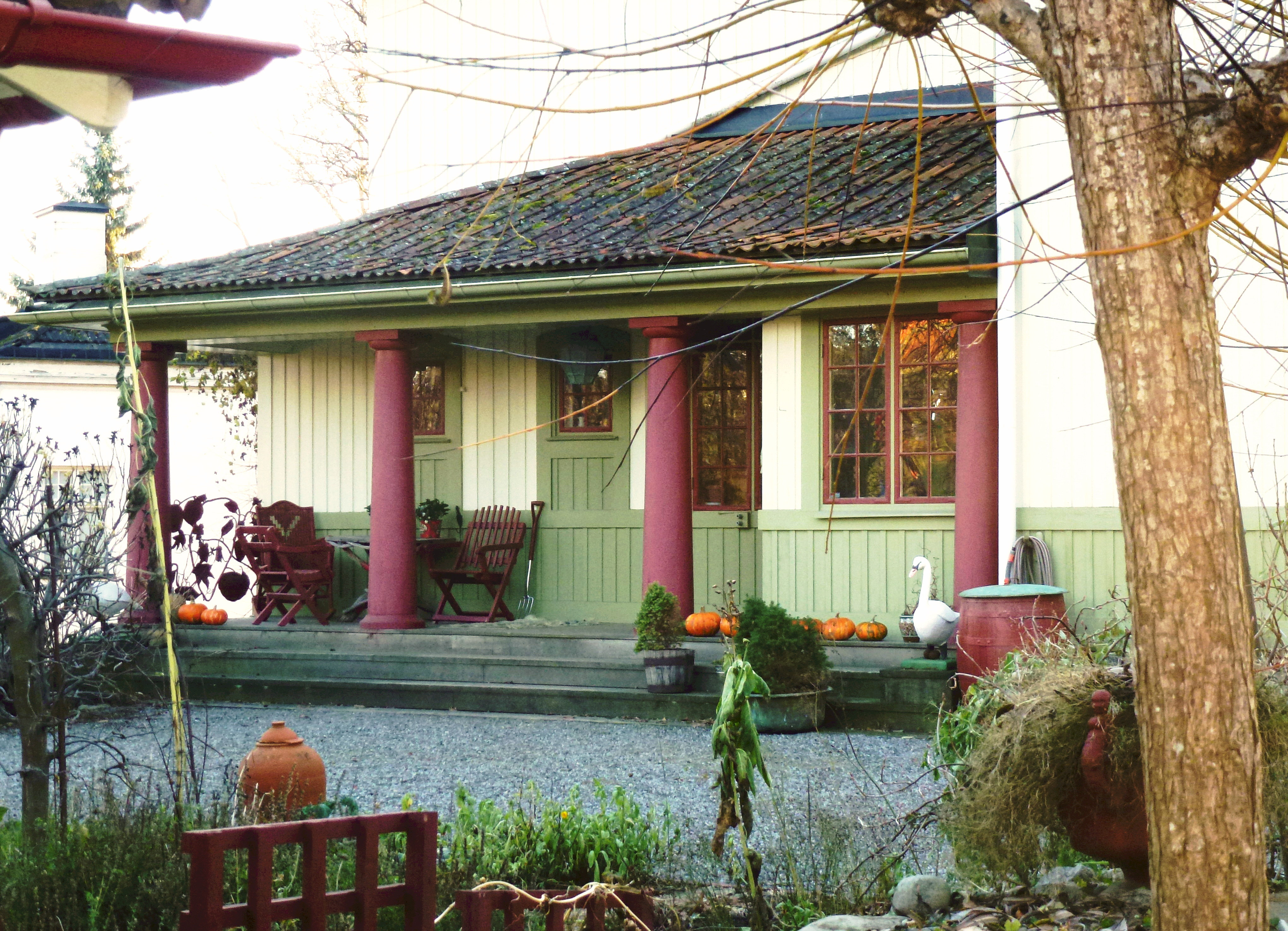 Villa Bellander, Storängen (Storängsv 26 alt John Lodéns v 11) arkitekt Ragnar Östberg. ursprungligen ritad av Sam Kjellberg och brandskadades.